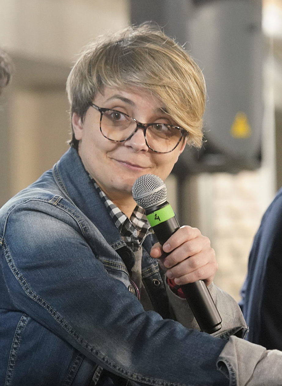 Natalia Mardero en la mesa "Escrituras de la memoria cotidiana", junto a Inés Bortagaray y Magela Ferrero.